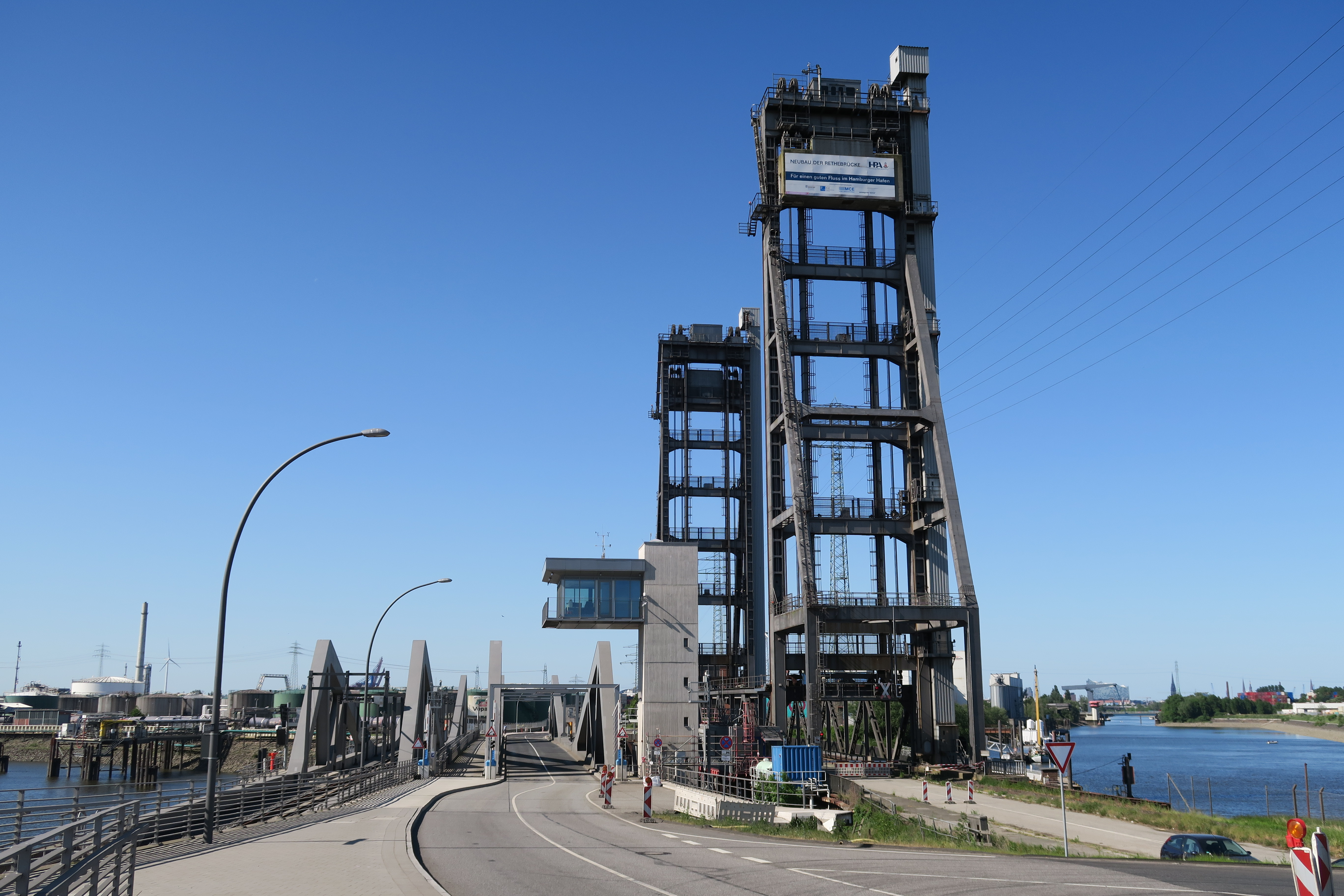 Rethebrücken 2018 in Hamburg-Wilhelmsburg; die Hubbrücke (rechts) ist schon gesperrt, die Klappbrücke (links) noch nicht vollständig in Betrieb (Oberleitung der Eisenbahn fehlt noch)